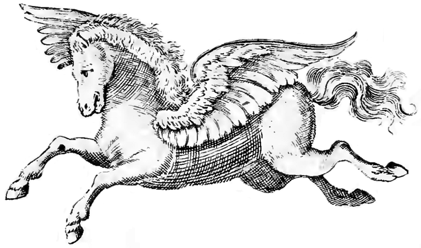 Pegaso x frontespizio "La Cicceide legittima"